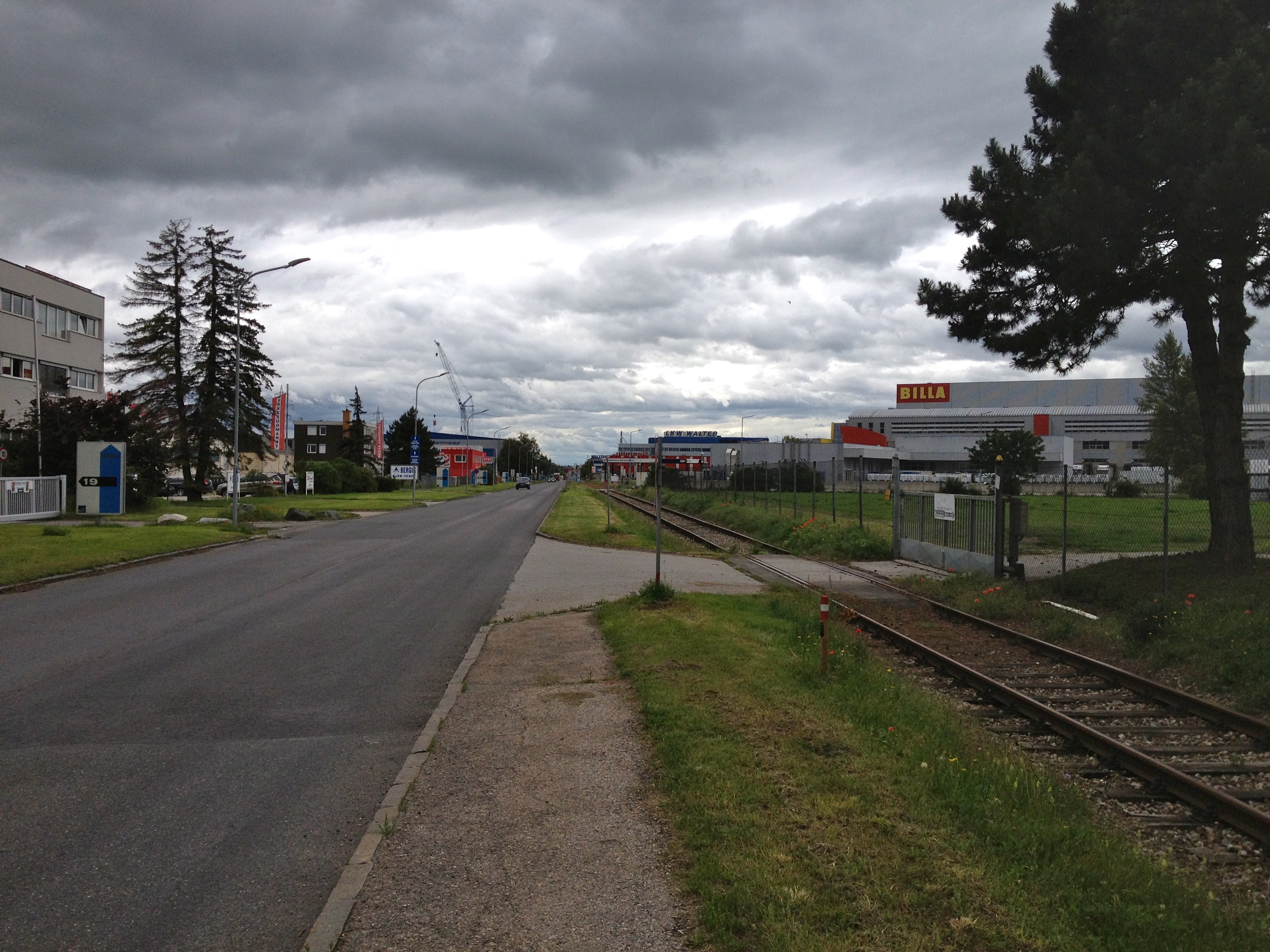 Industriezentrum Niederösterreich Süd